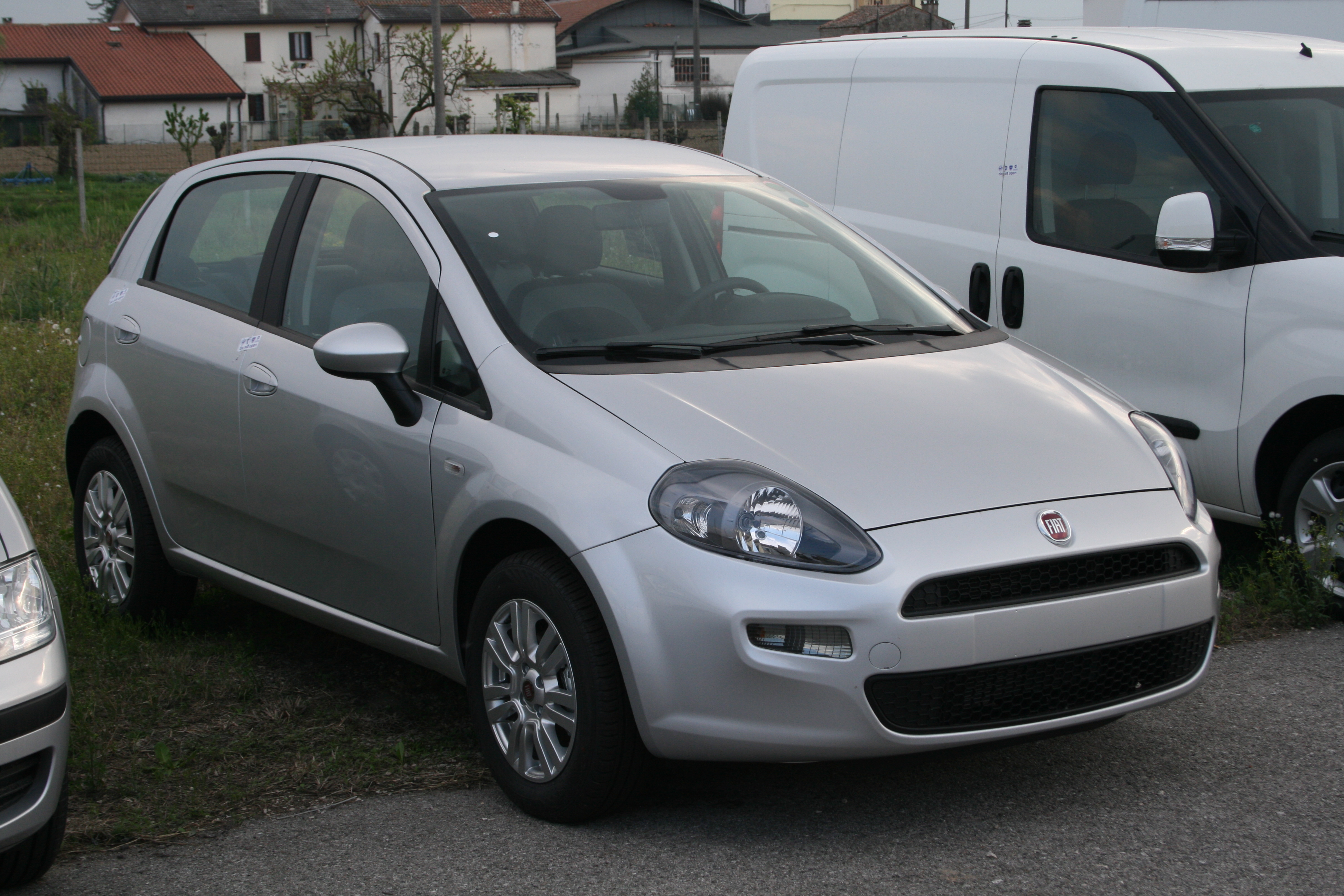 Una Fiat Punto 2012 grigia